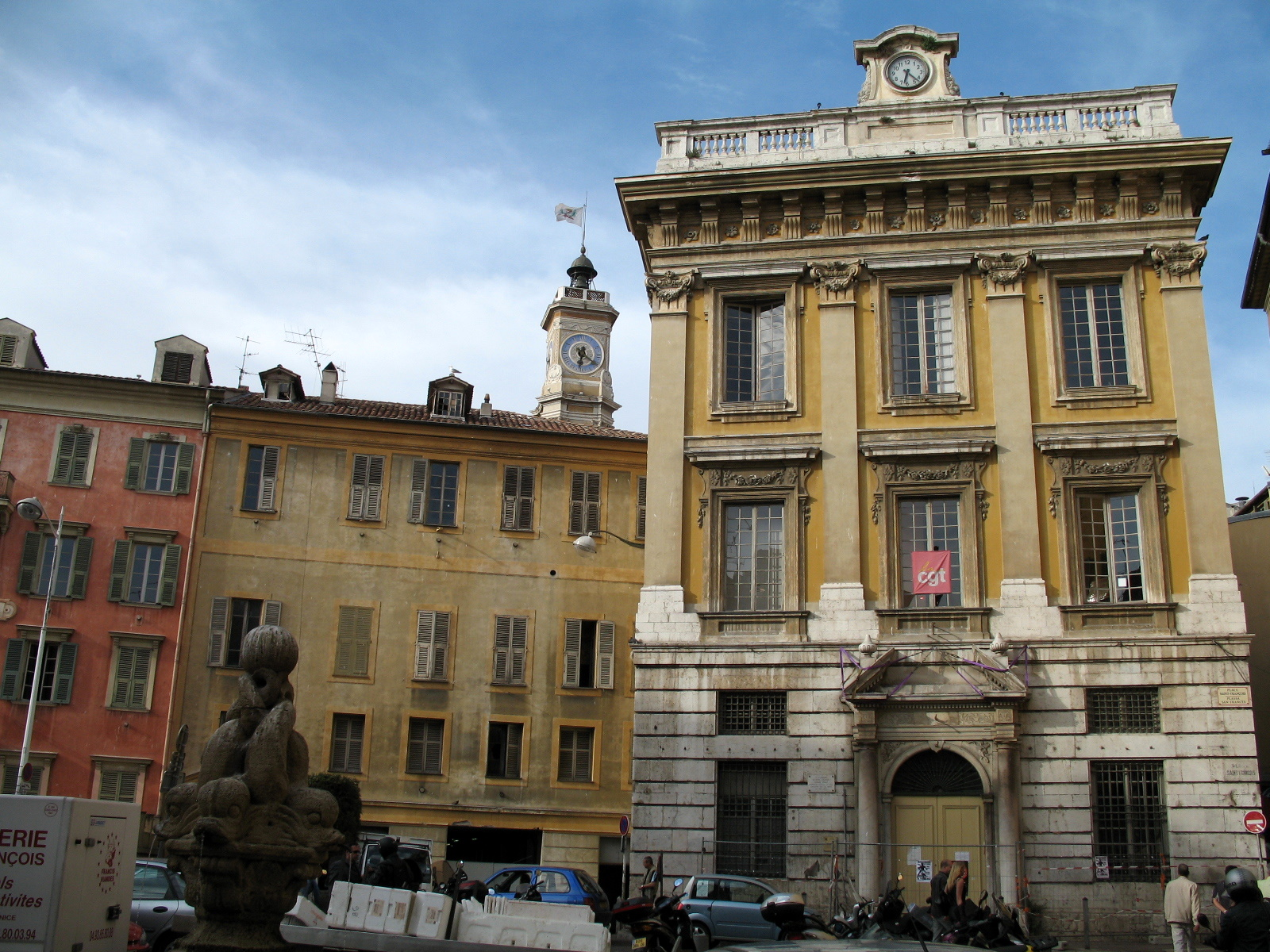 Le palais communal de Nice dans les Alpes maritimes.